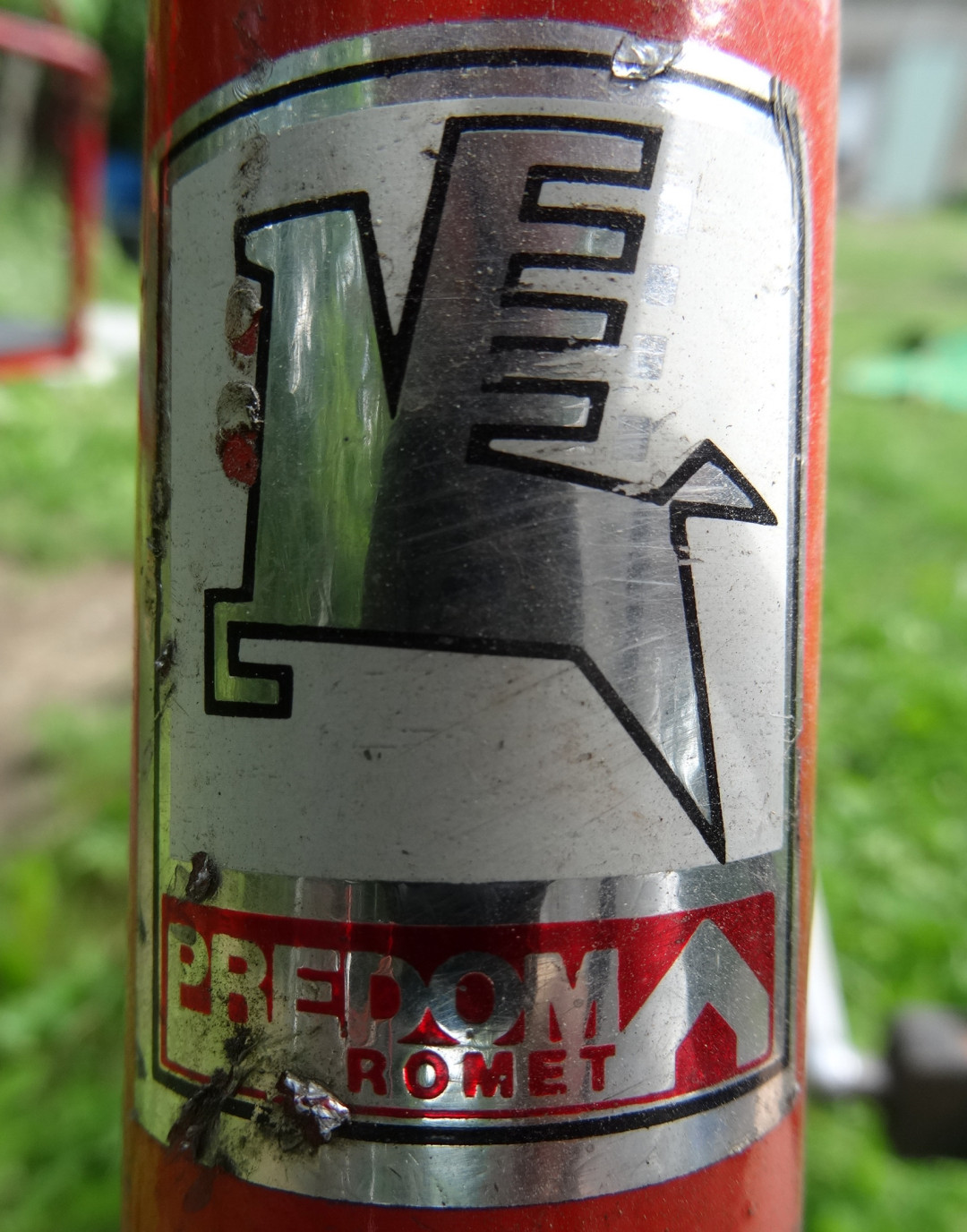 Logo Zakładów Rowerowych "Predom-Romet" - naklejka na rowerze Romet z lat 80. XX w.